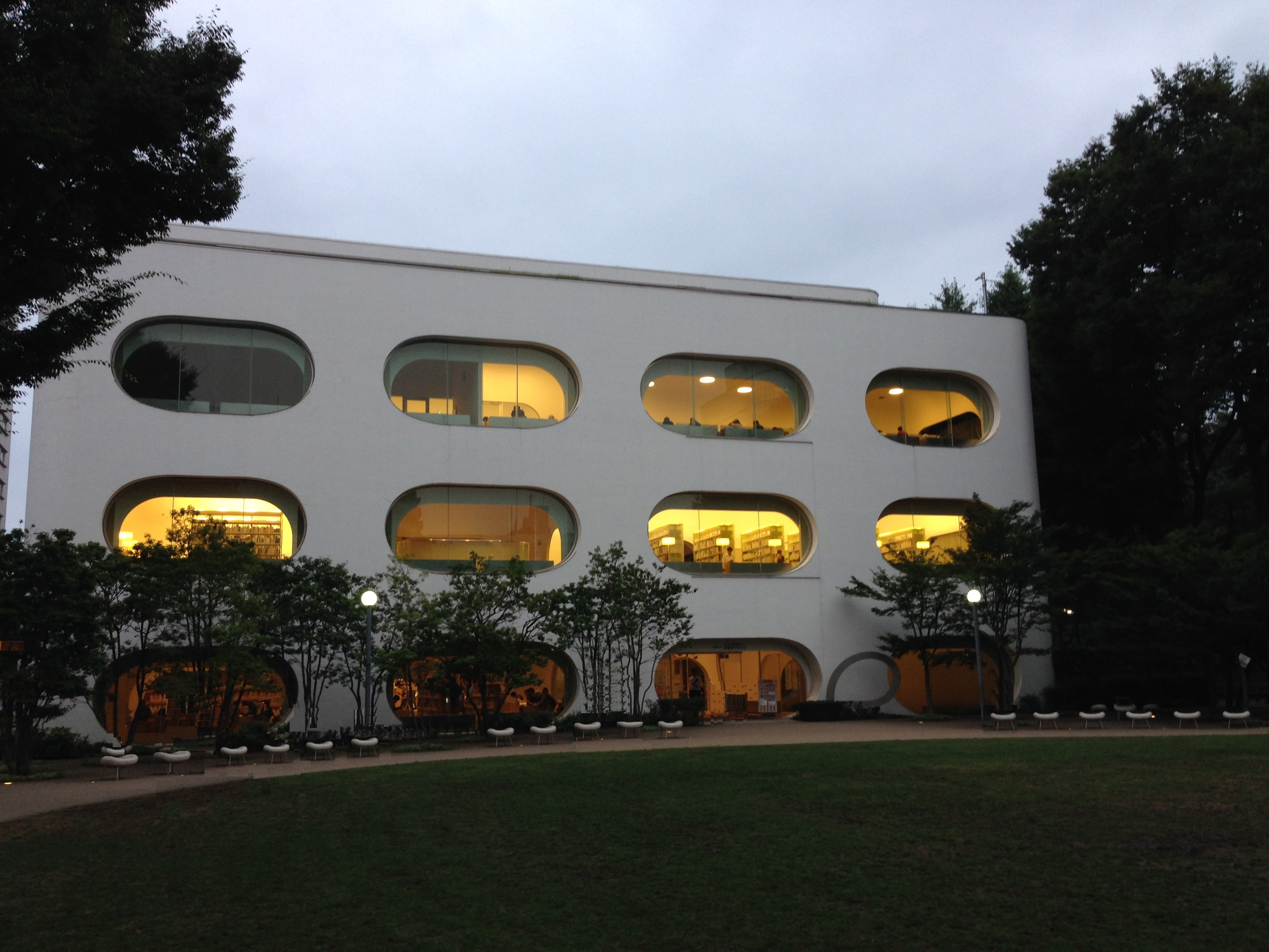 武蔵野プレイス（東京都武蔵野市）